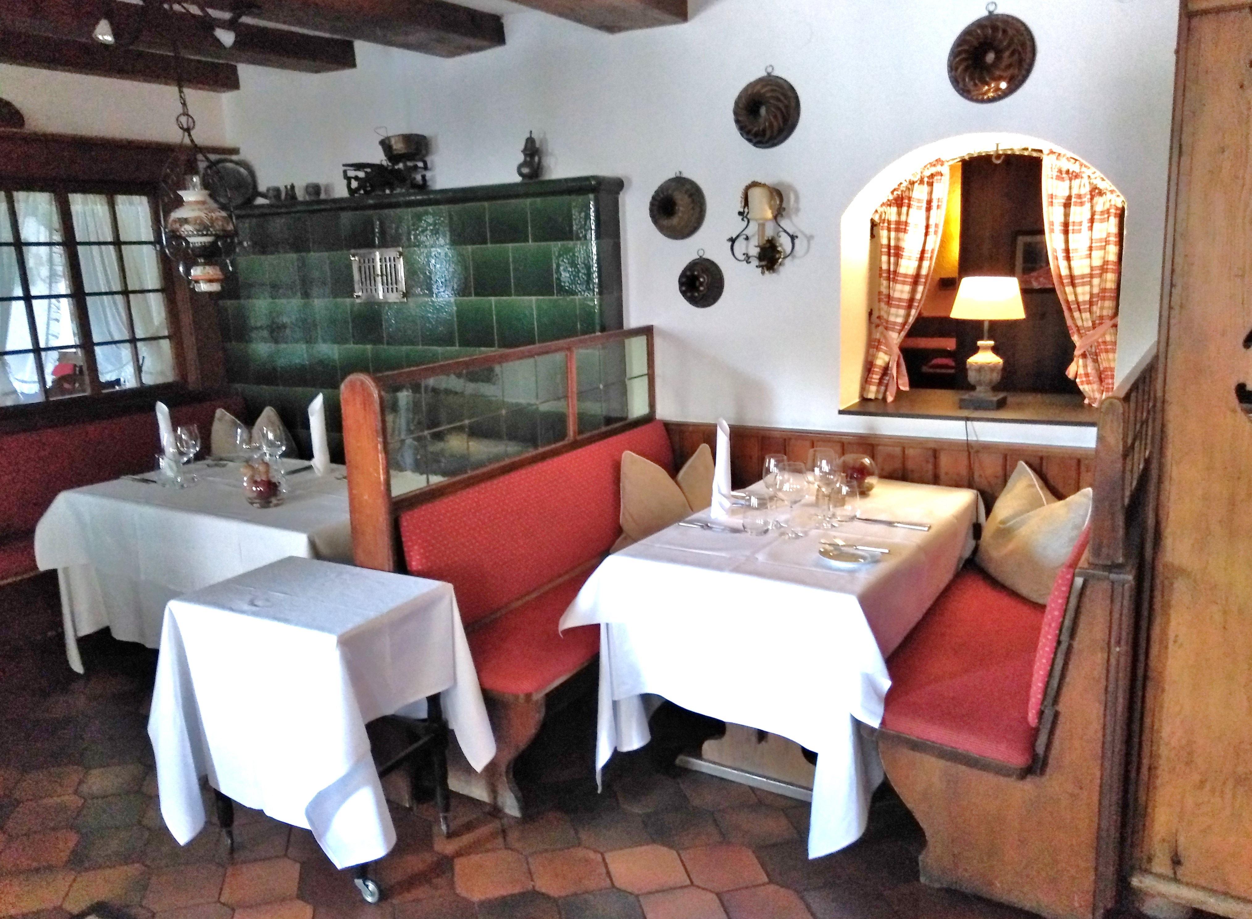 AR.H Gasthof Adler in der Gemeinde Häusern im Landkreis Waldshut in Baden-Württemberg im Südschwarzwald. Der Gasthof führt einen Doppeladler (als Schwarzwaldhaus 1596 nachweisbar). Seit 1966 wird das Restaurant Adler Häusern mit einem Michelin Stern ausgezeichnet. Es gilt als das älteste Sternerestaurant Deutschlands. Der Bereich “Wirtshus” in der alten Gaststätte.